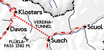 Darstellung zeigt dsa Netz der Rhätischen Bahn. Zeichnung erstellt 2004 von Benutzer:Sansculotte. Bild ist unter der GNU FDL zur weiteren Verwendung freigegeben. Quellenangabe und Beleg an erbeten.